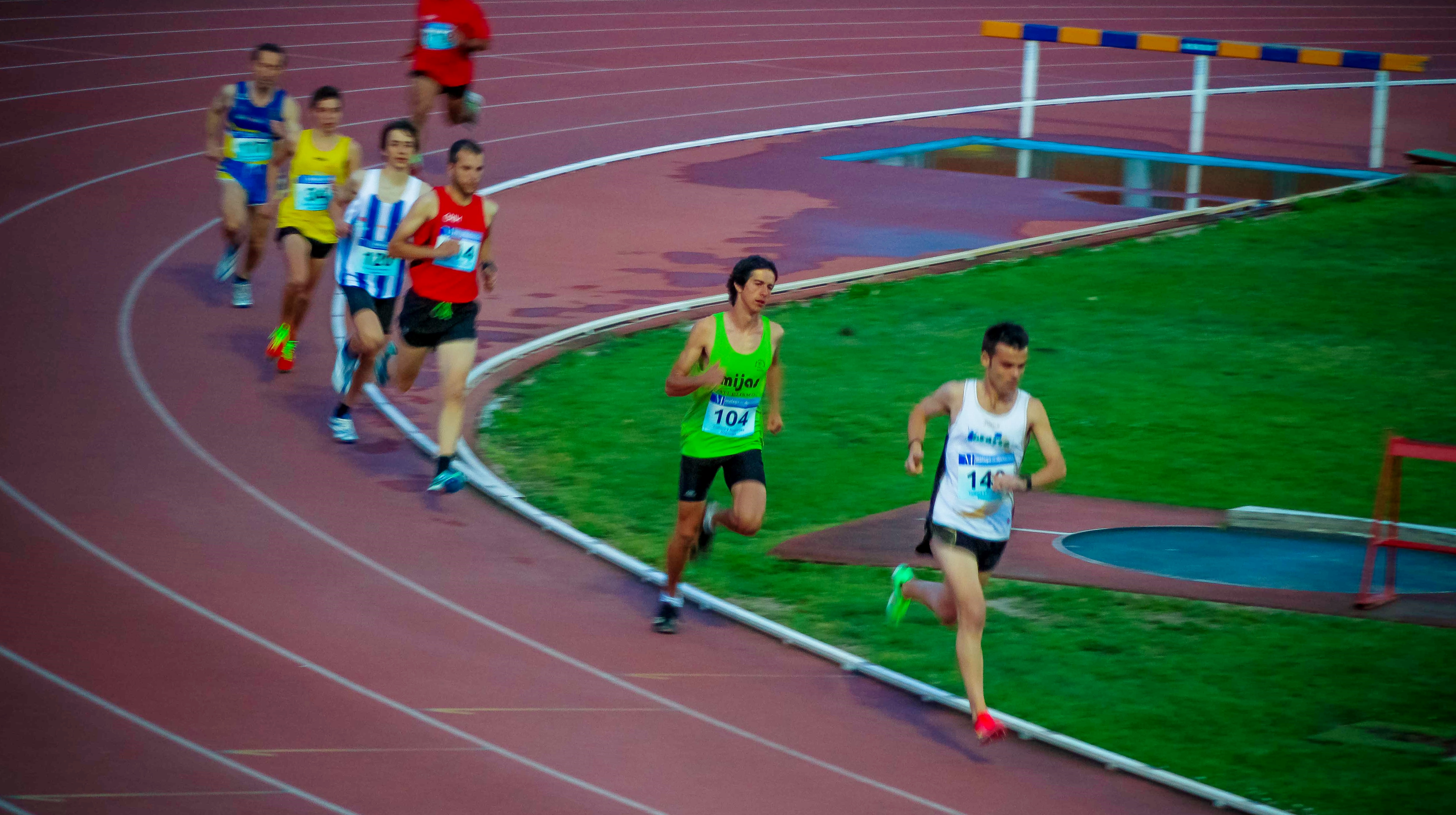 Ciudad Deportiva de Carranque, Málaga, España